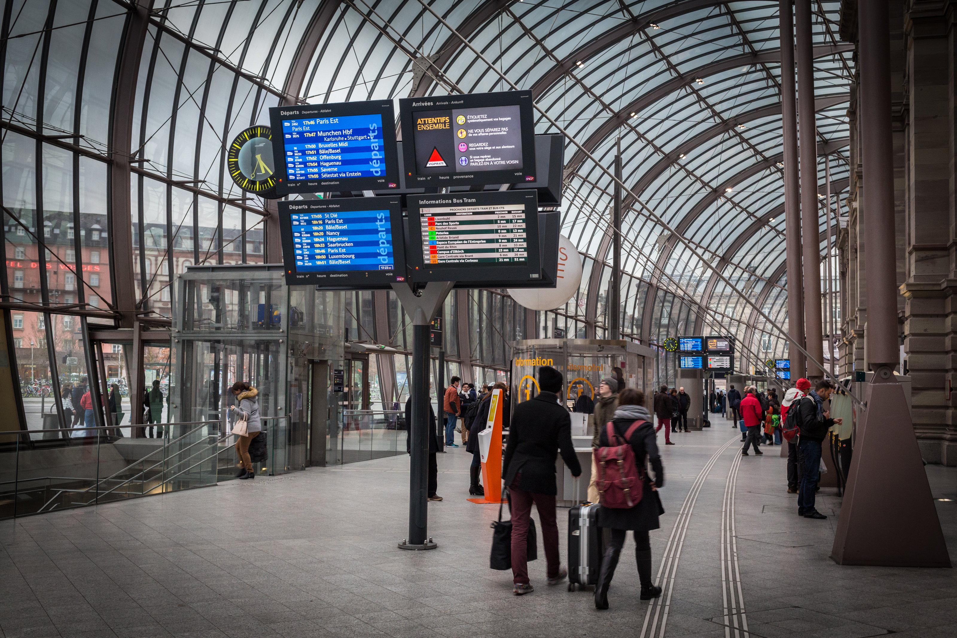 Strasbourg, gare centrale, écrans d'affichage sous la verrière.